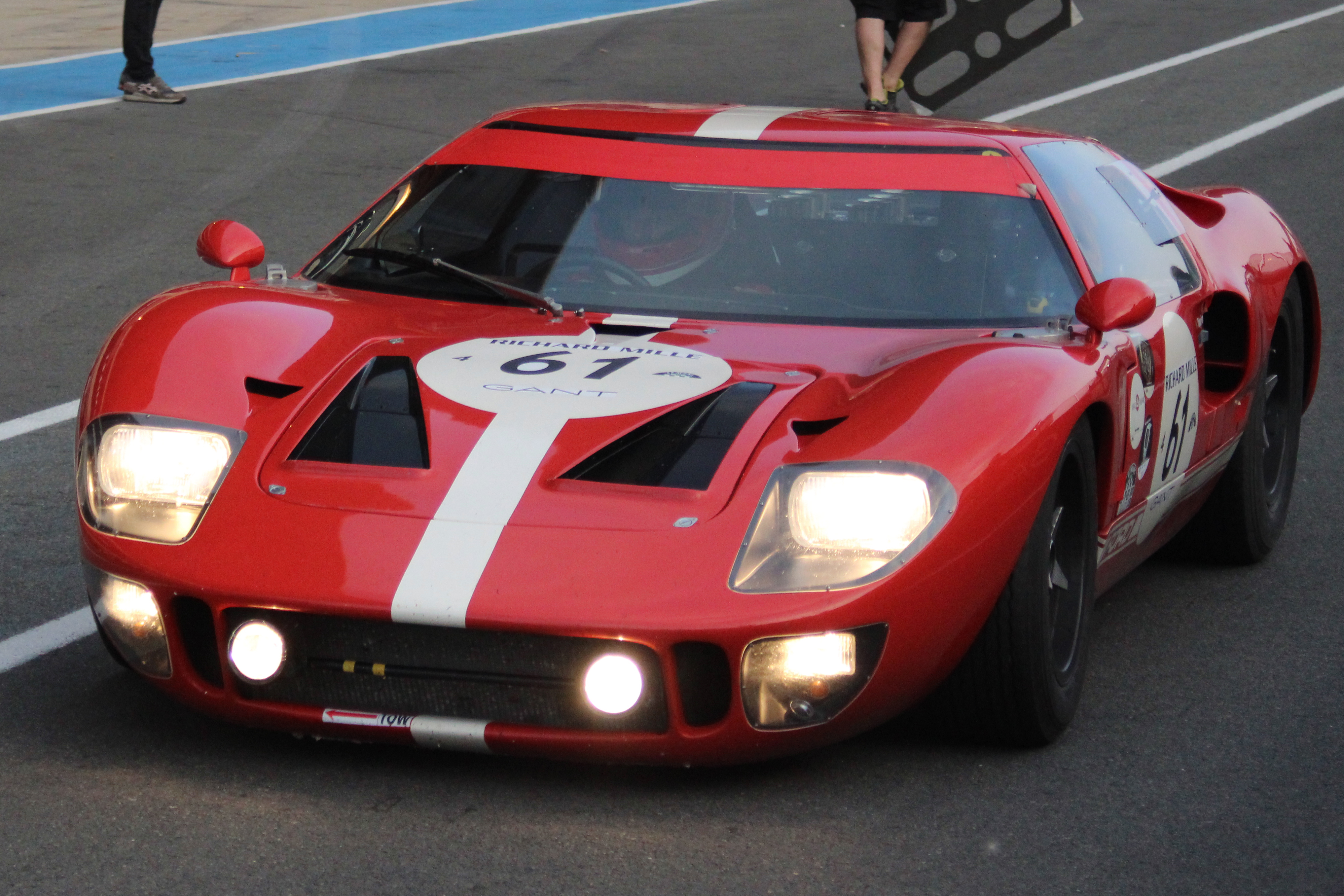 Ford GT40 Mk1 (1965) vainqueur du Plateau 4 au Le Mans Classic 2018